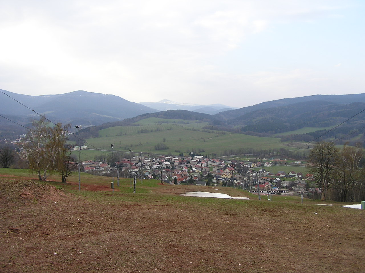 Mladé Buky ze sjezdovky